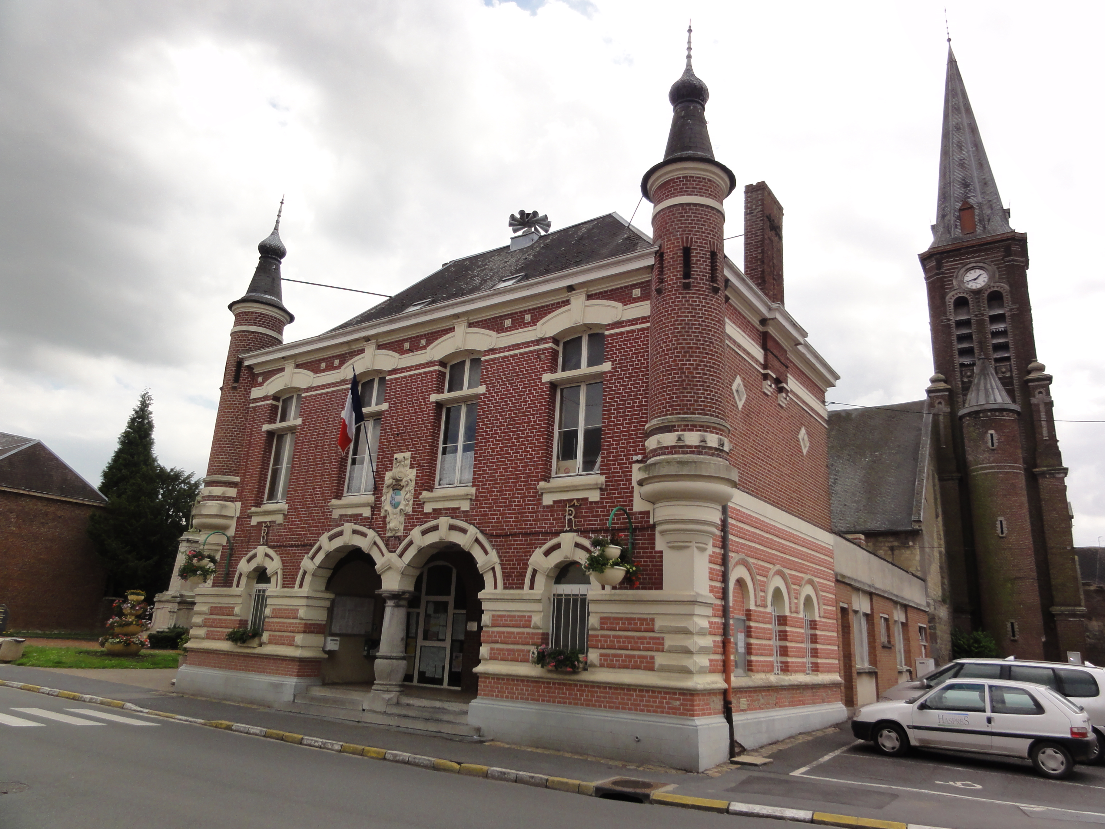 Haspres (Nord, Fr) mairie et église